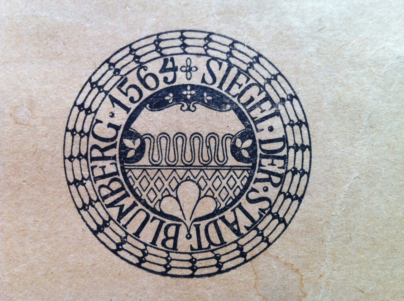 Blumberg, Stadt im Schwarzwald-Baar-Kreis in Baden-Württemberg. Altes Siegel der Stadt (1564). Abbildung auf Einband des Buches von Josef Bader: Blumberg.